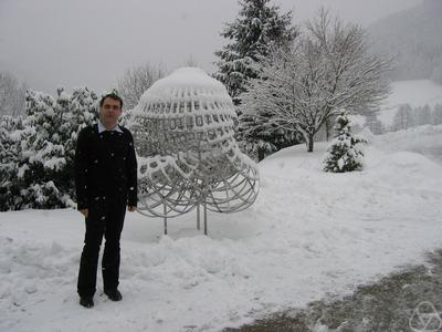 Adrian Constantin (* 1970)